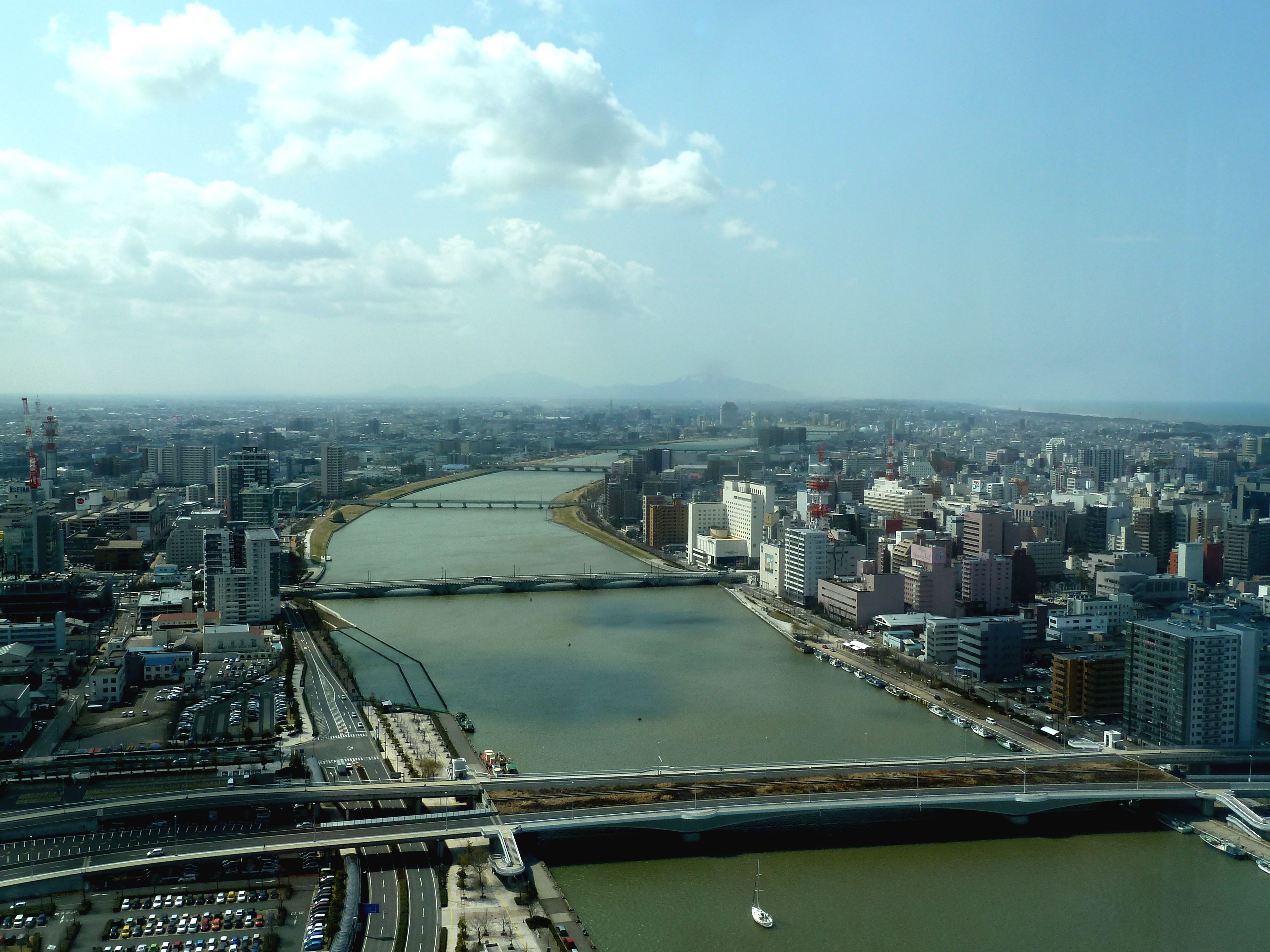 信濃川河口付近